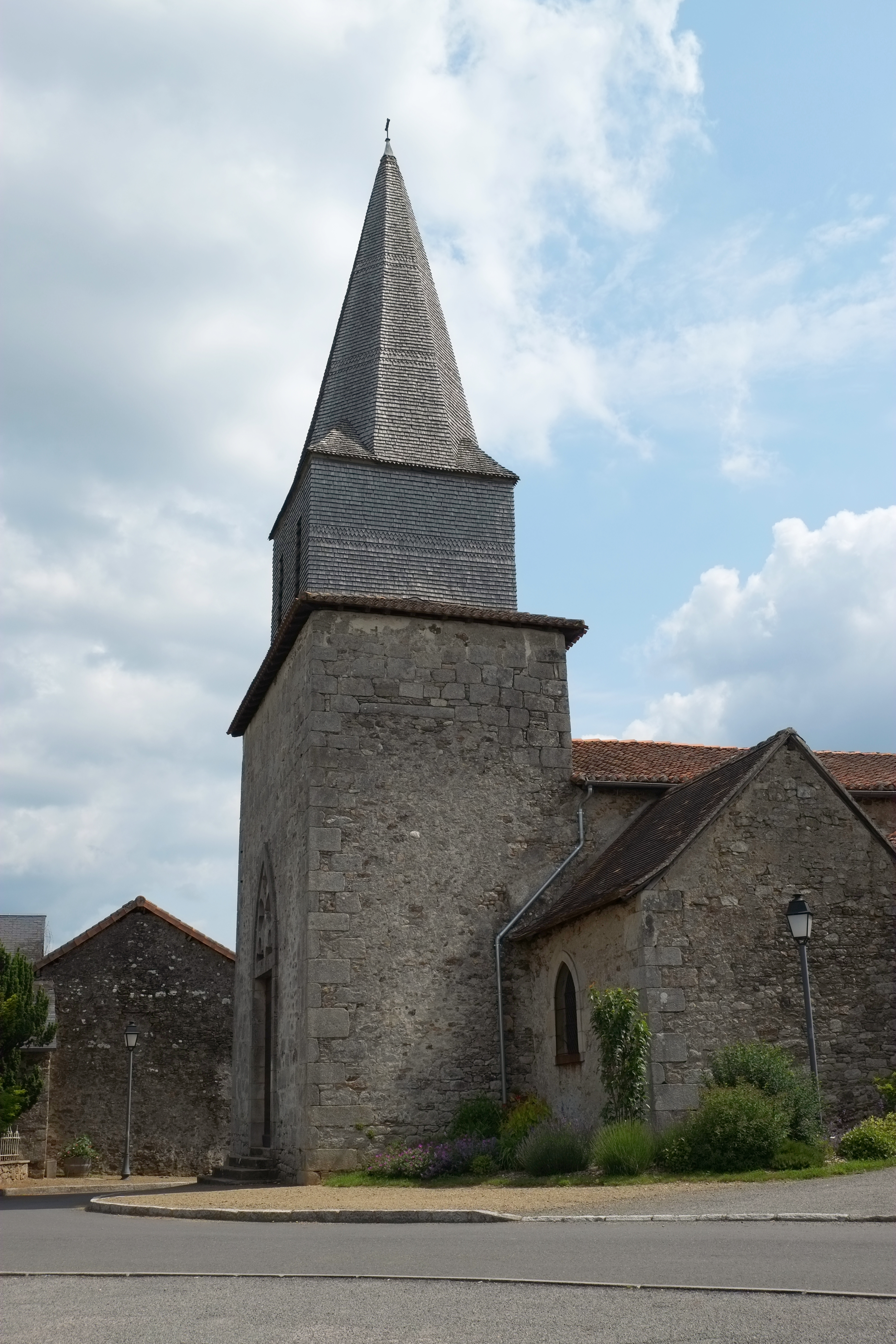 Kirche Saint-Denis in Saint-Denis-des-Murs im Département Haute-Vienne der Region Lomousin (Frankreich)